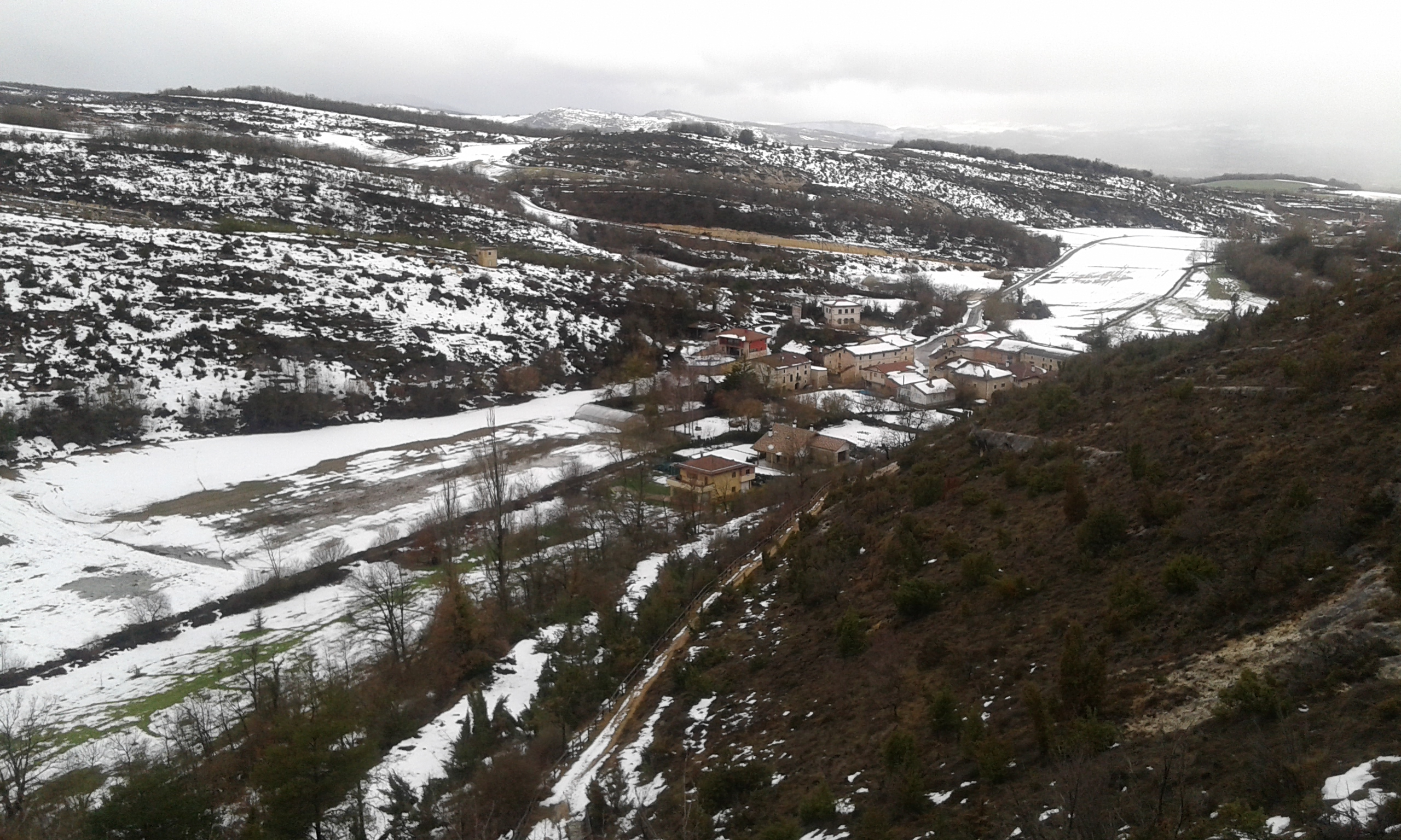 Faidoren goitiko ikuspegia